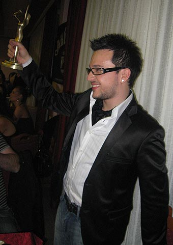 MakFest